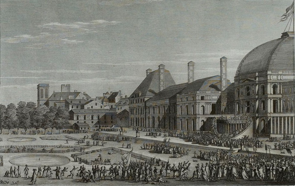 Fête de l'Etre suprême le 8 juin 1794 aux Tuileries, Musée de la révolution française - Vizille